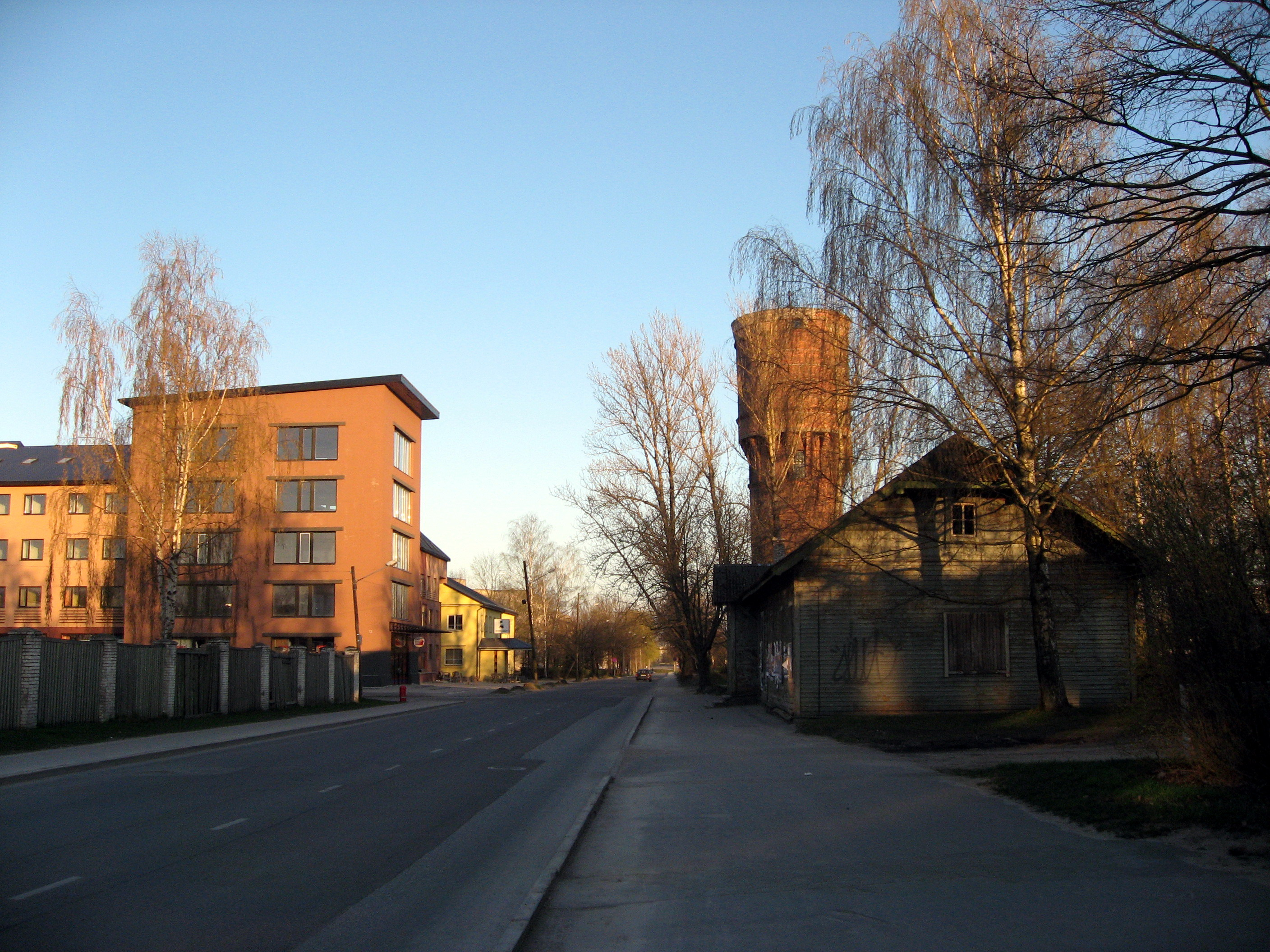 Tartu